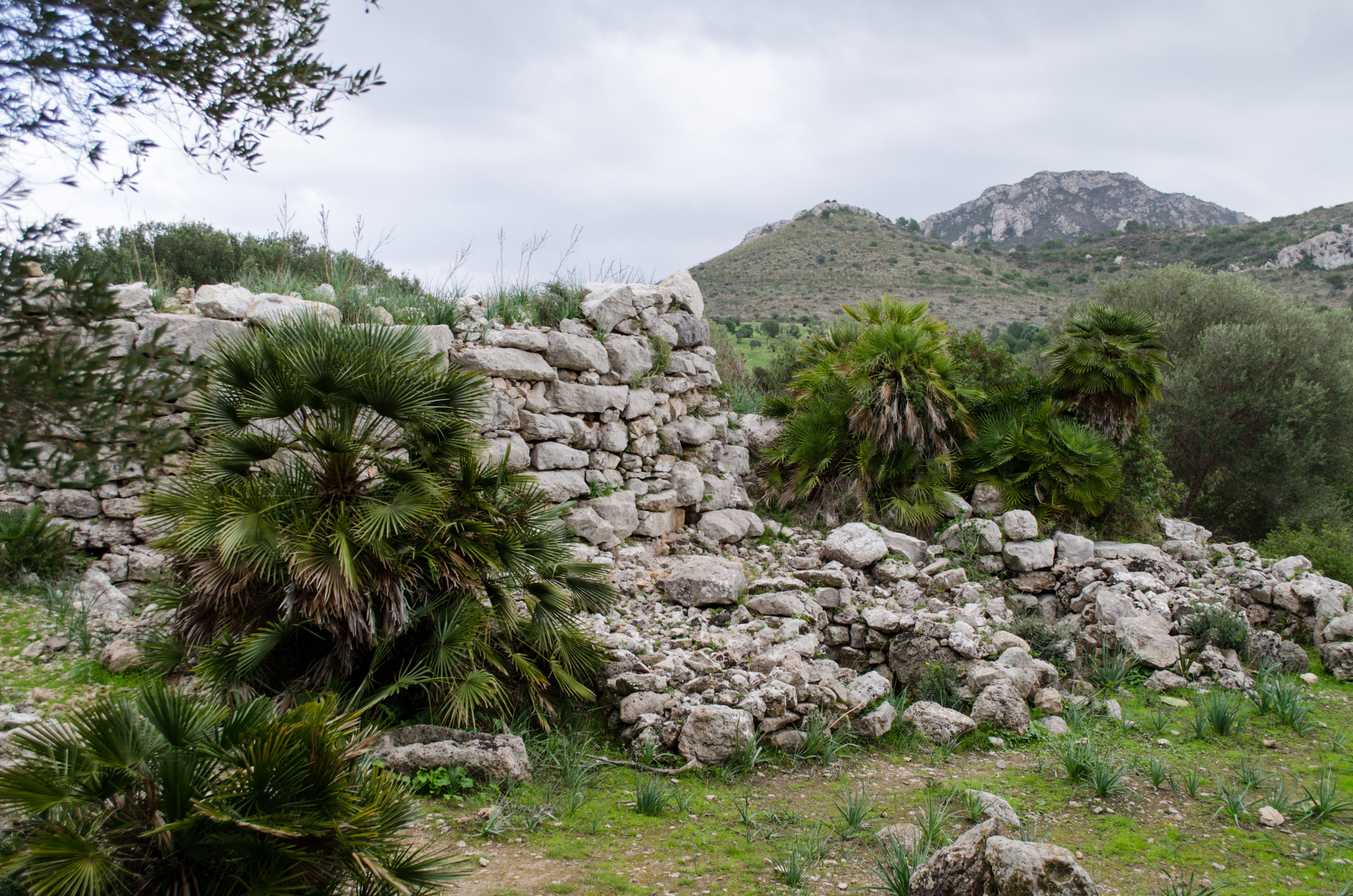 Es claper des Gegant